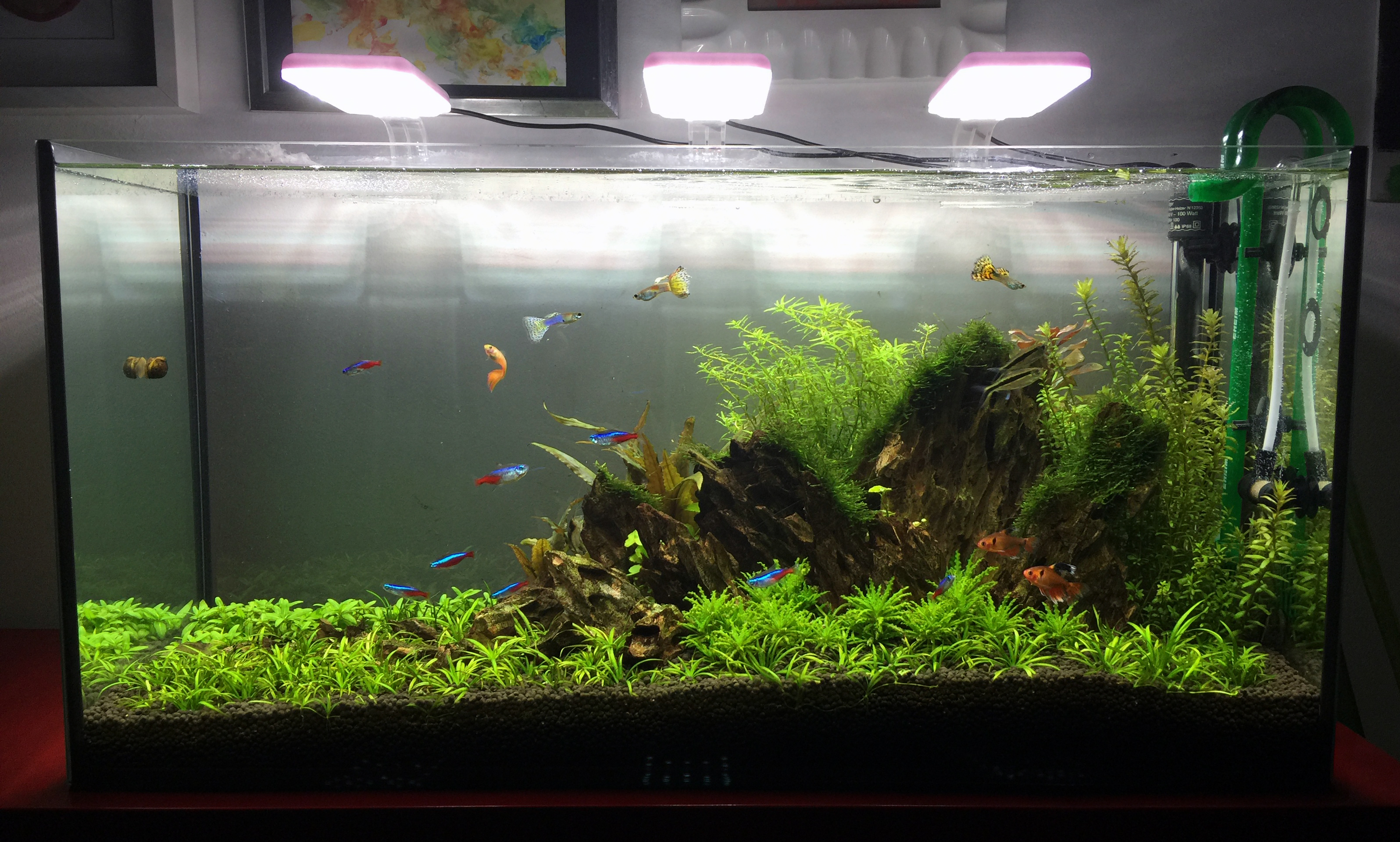 Las lámparas led aportan estética al acuario a la vez de una reducción de consumo eléctrico